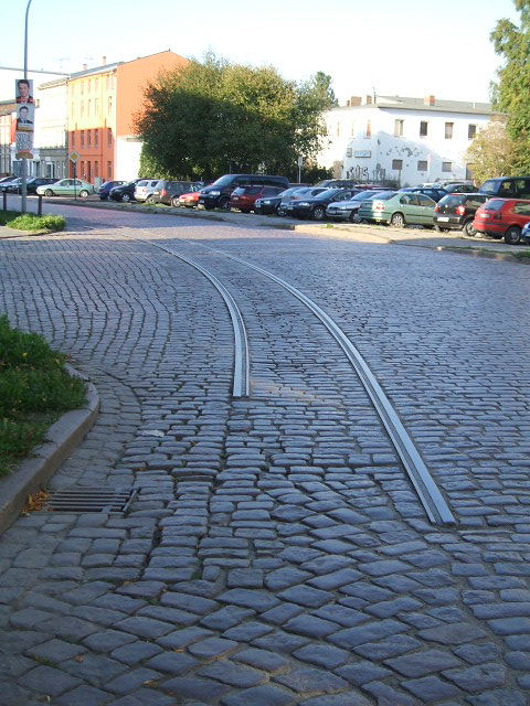 Stralsund, Germany, Frankendamm mit Resten der Straßenbahnschienen